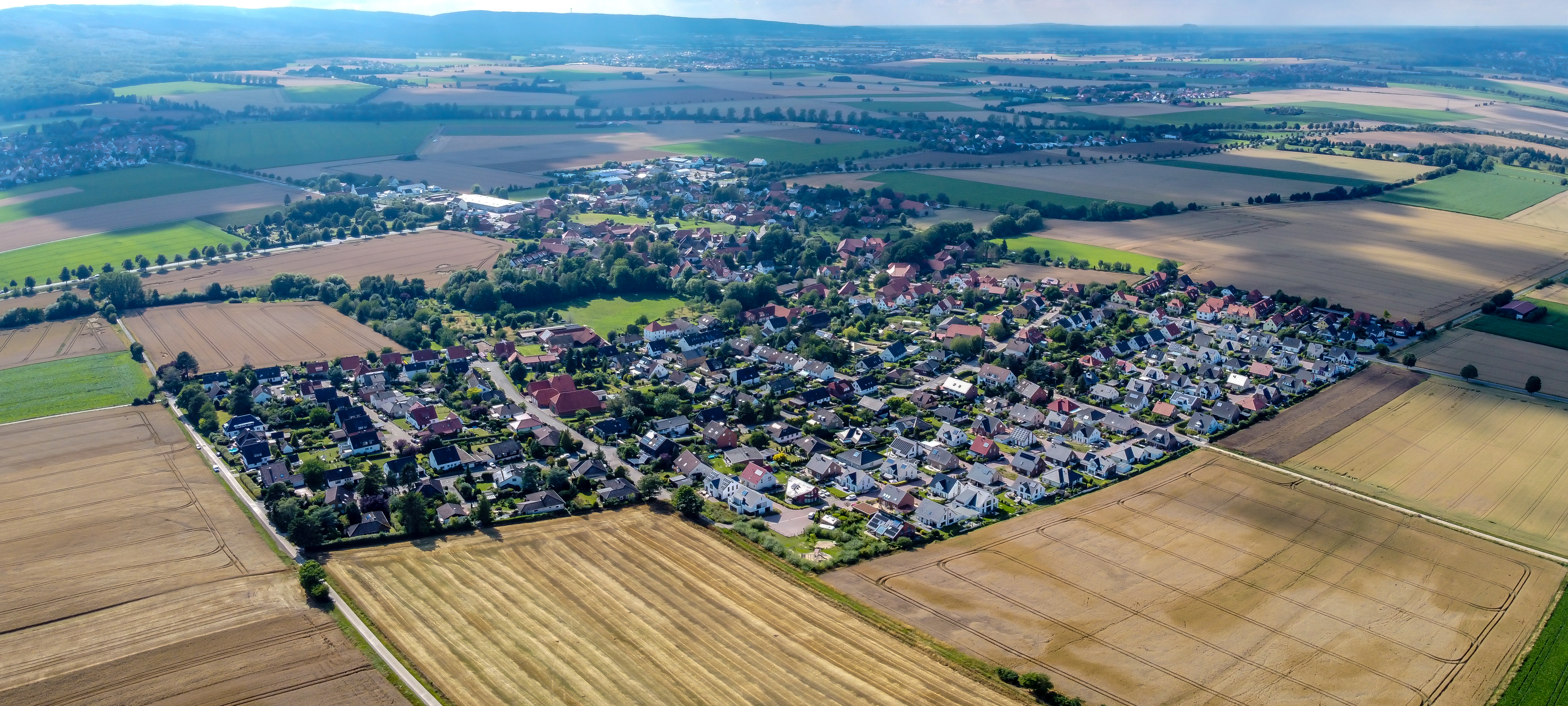 Panorama von Holtensen